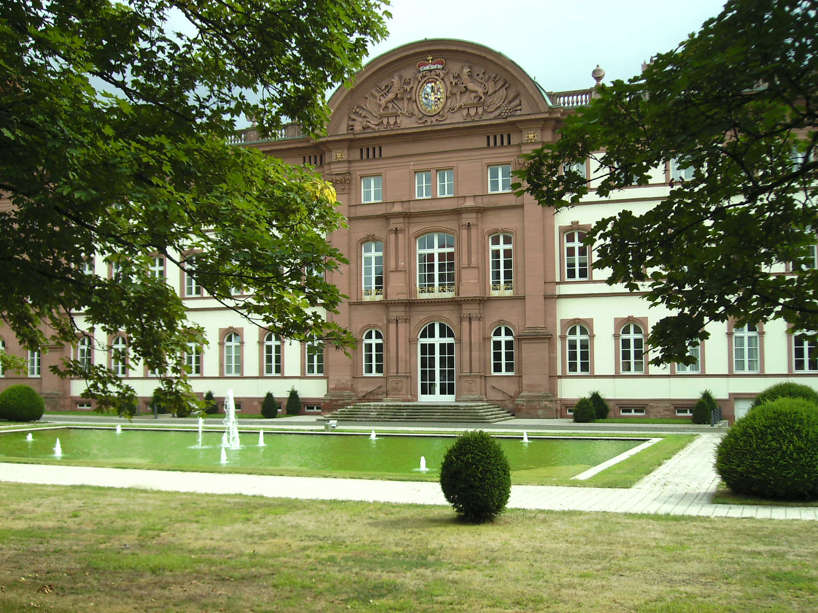 Nordseite des Schlosses Zweibrücken mit Schlossgarten